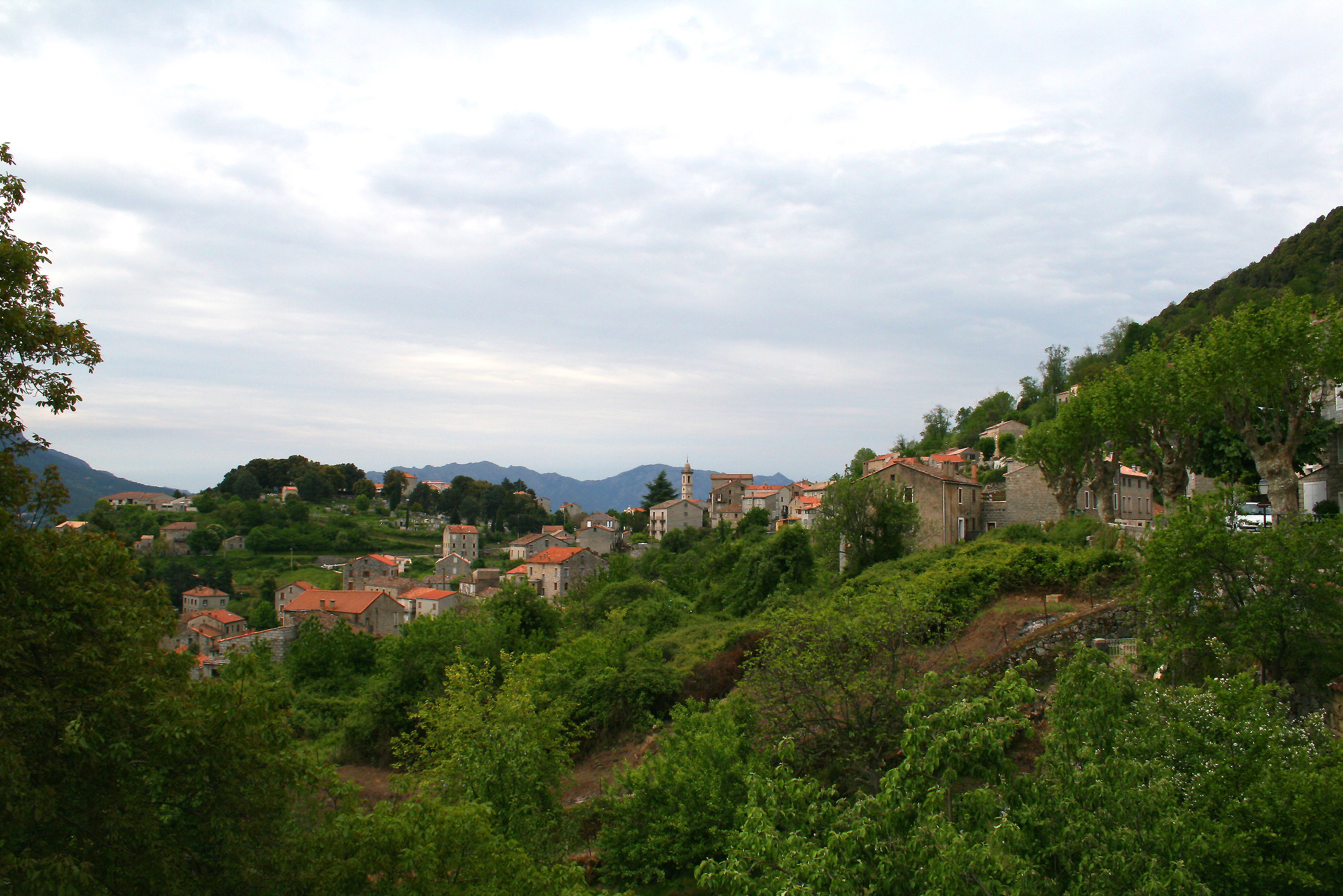 Levie - France - Corse du Sud, vue du vieux village. Corsu: Livìa - Pumonti, vista llu vechju paesi.